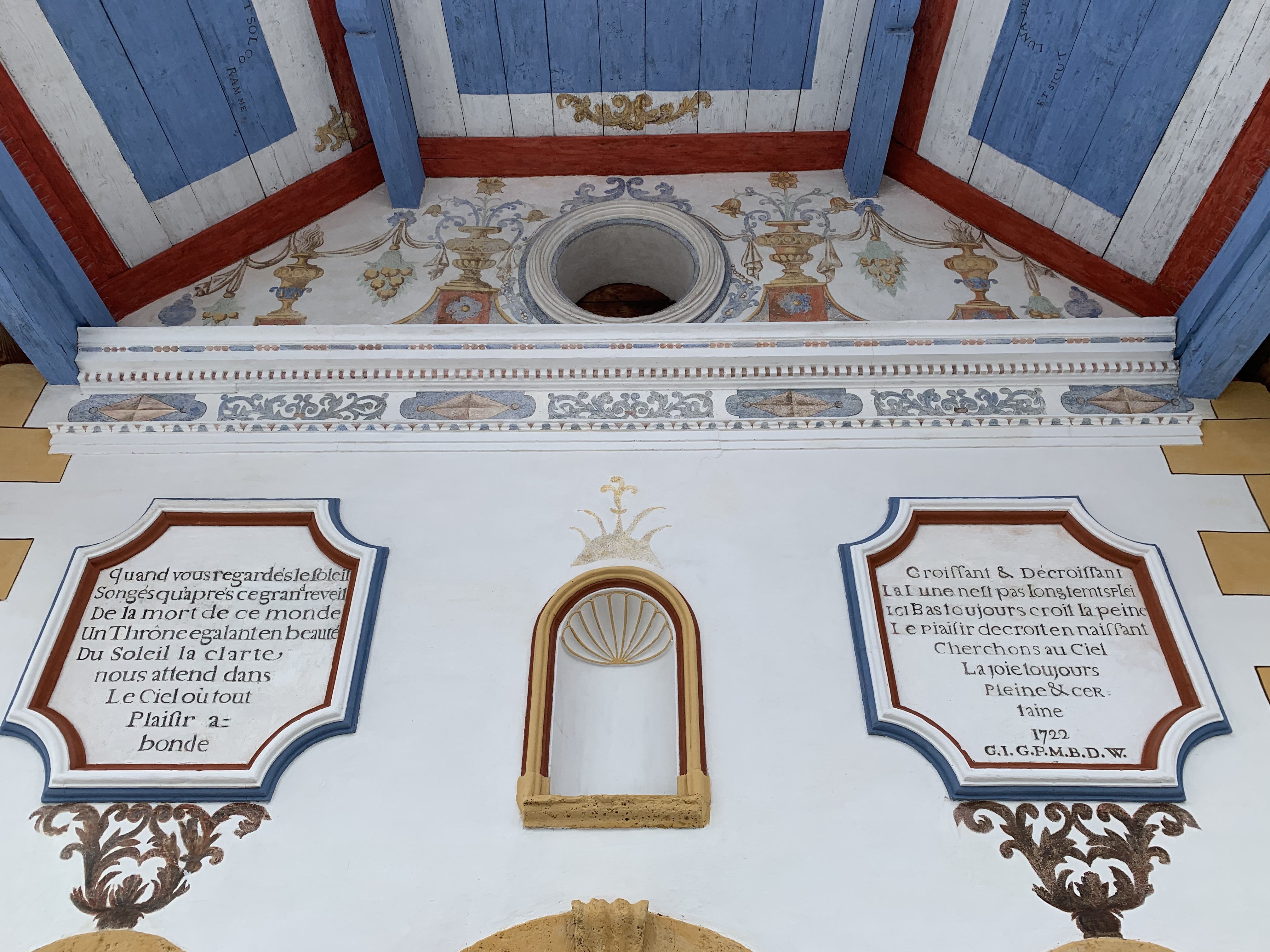 Médaillons sur la façade principale